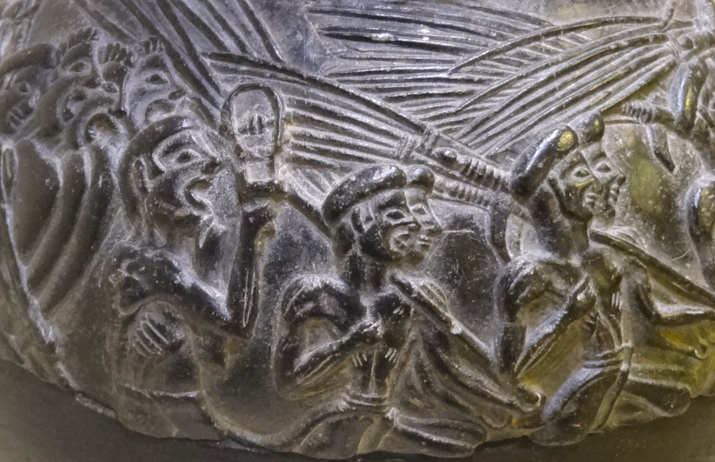 Detail des Reliefs der „Schnittervase“, Reliefrhyton aus Speckstein (Neupalastzeit 1500–1450 v. Chr.) aus Agia Triada, ausgestellt im Archäologischen Museum Iraklio, Kreta, Griechenland